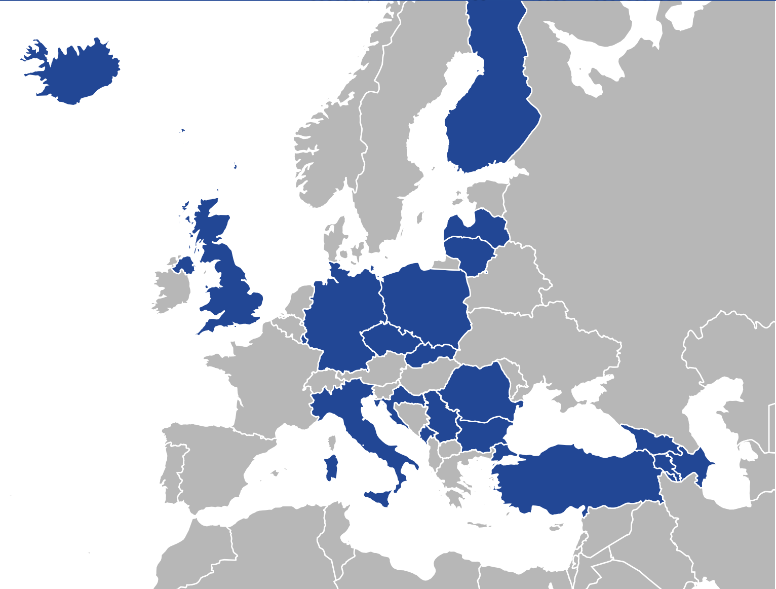 AECR map 2018-09-11.png